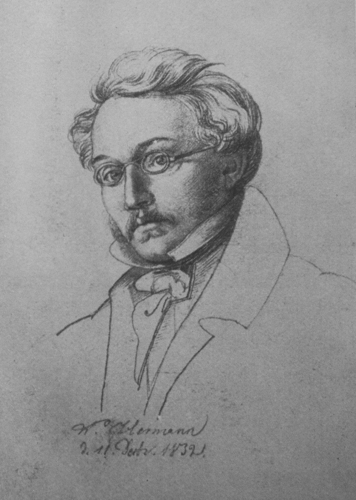 Woldemar Hermann. In: Hans Geller: Ein Jünger der "göttlichen Kunst". Das Lebensbild des Nazareners Adolf Zimmermann. In: Neues Lausitzisches Magazin, Band 110 (1934), S. 171-229 und Anhang